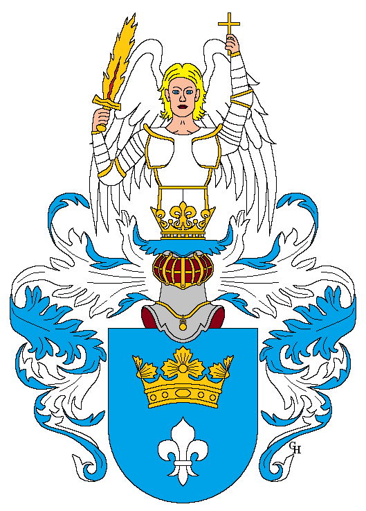 Wappen des katholischen Aktivisten und k.u.k. Generalmajors Heinrich Himmel (1843–1915), verliehen anlässlich seiner Erhebung in den österreichischen Adelsstand mit dem Prädikat "von Agisburg" 1890. Zeichnung von Gerd Hruška ( Für weitere Informationen zu dieser Standeserhebung siehe (